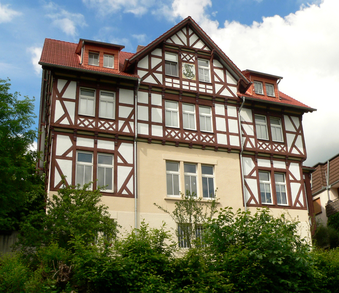 Ehemaliges Haus Andreesche Tischgesellschaft ATG Münden